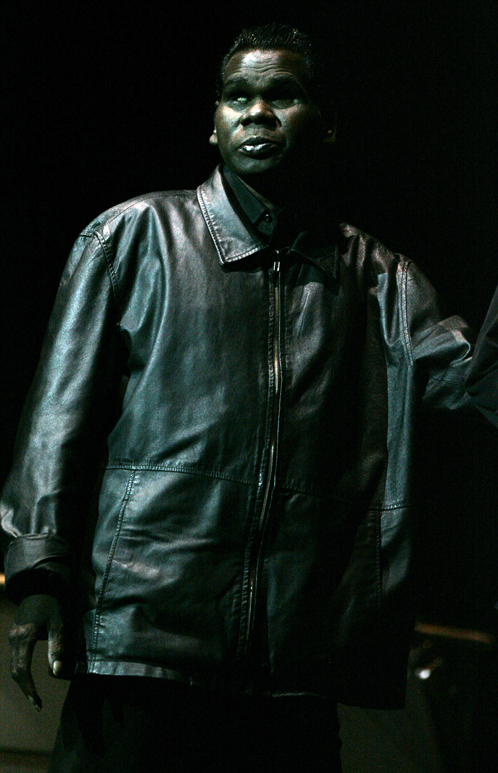 Gurrumul